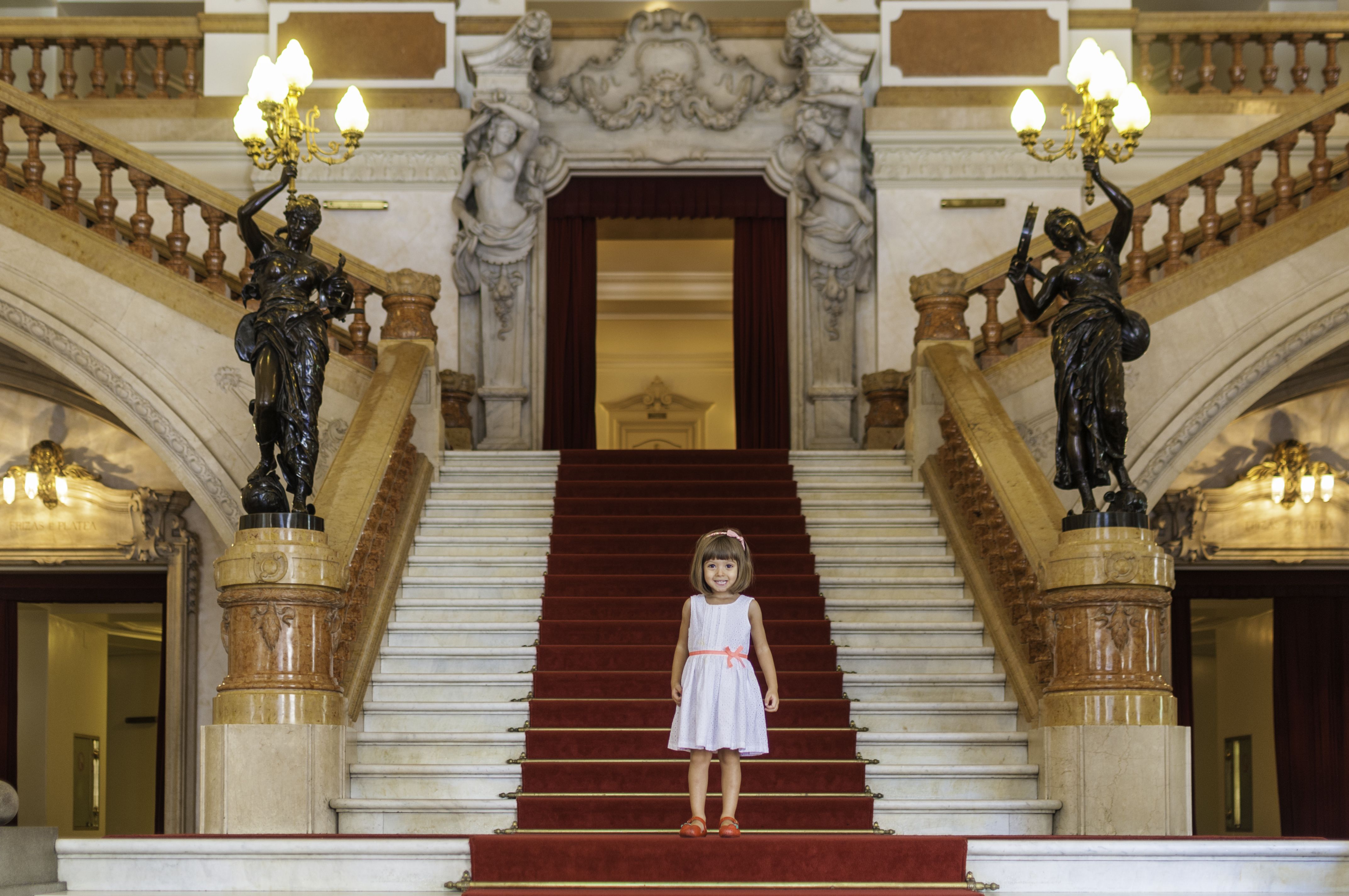 Niña en Teatro Municipal de São Paulo